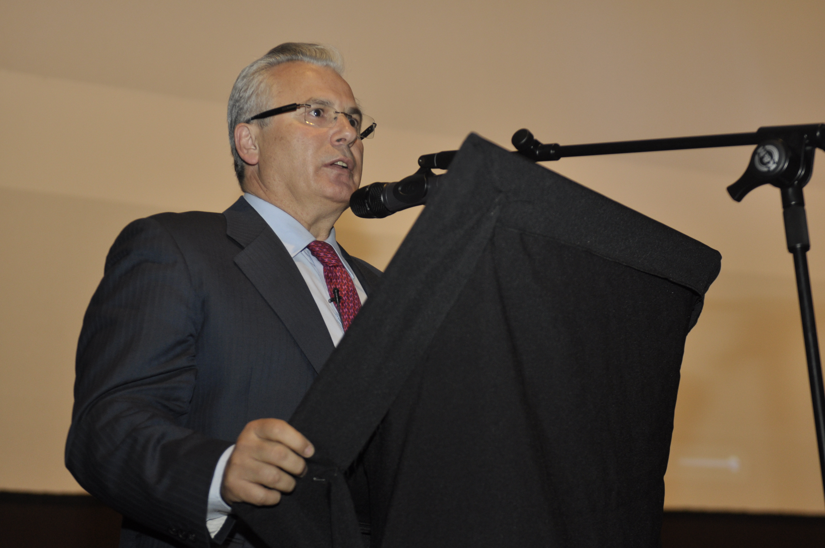 El ex juez Baltasar Garzón; la presidenta de Abuelas de Plaza de Mayo, Estela de Carlotto; y la premio Nóbel de la Paz Rigoberta Menchú, participaron de la conferencia "Diálogo sobre la perspectiva y defensa de los Derechos Humanos en América Latina" que se realizó en la UMET. Mi sitio